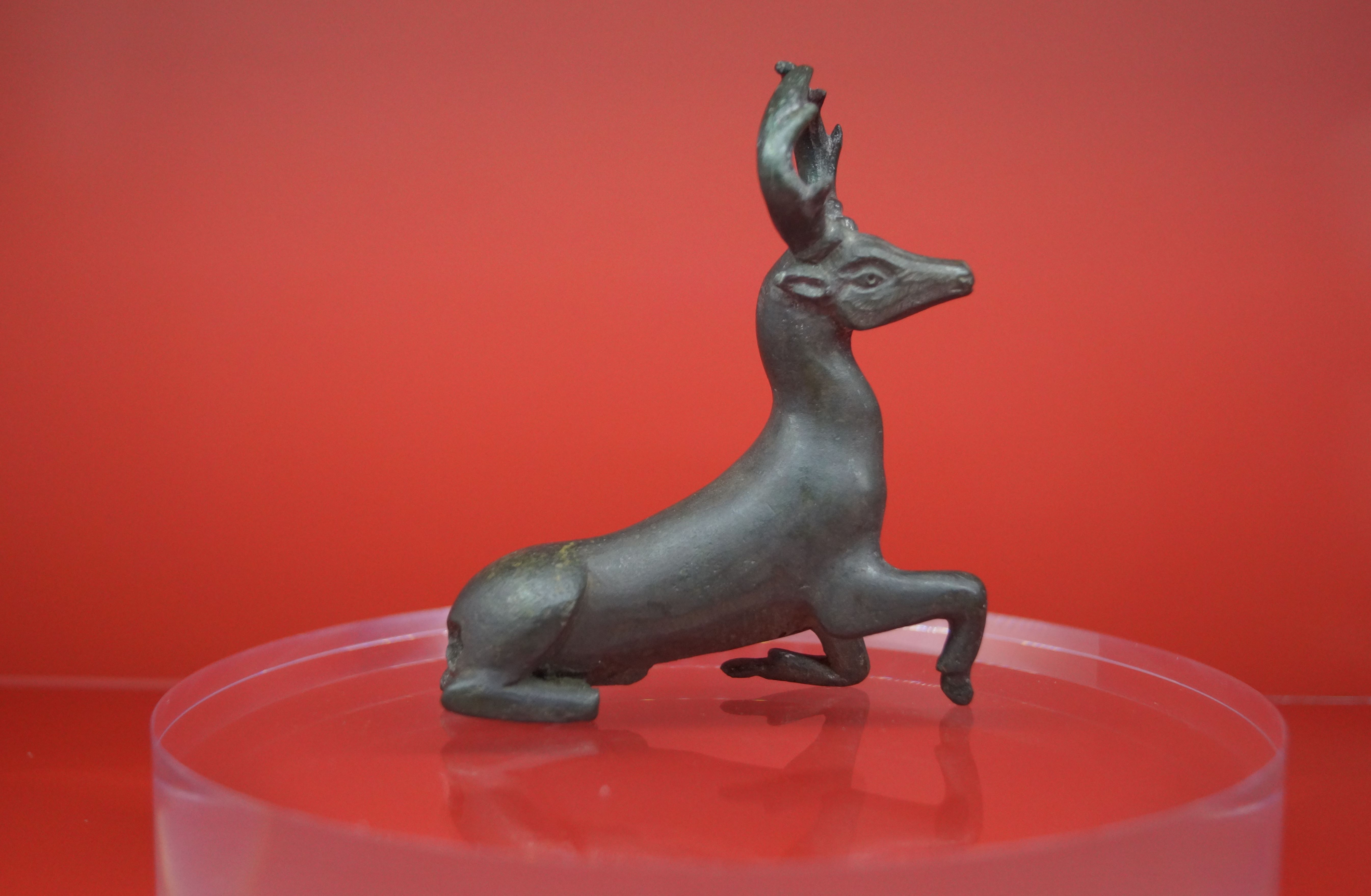 Bronze-Hirschstatuette aus Saalfelden, Biberg, Mittel- und Spätlatenezeit 275-15 v. C. im Keltenmuseum Hallein, das in der Tennengauer Bezirkshauptstadt Hallein im österreichischen Bundesland Salzburg liegt und zu den bedeutendsten Sammlungen von Zeugnissen keltischer Kunst und Geschichte in Europa zählt.